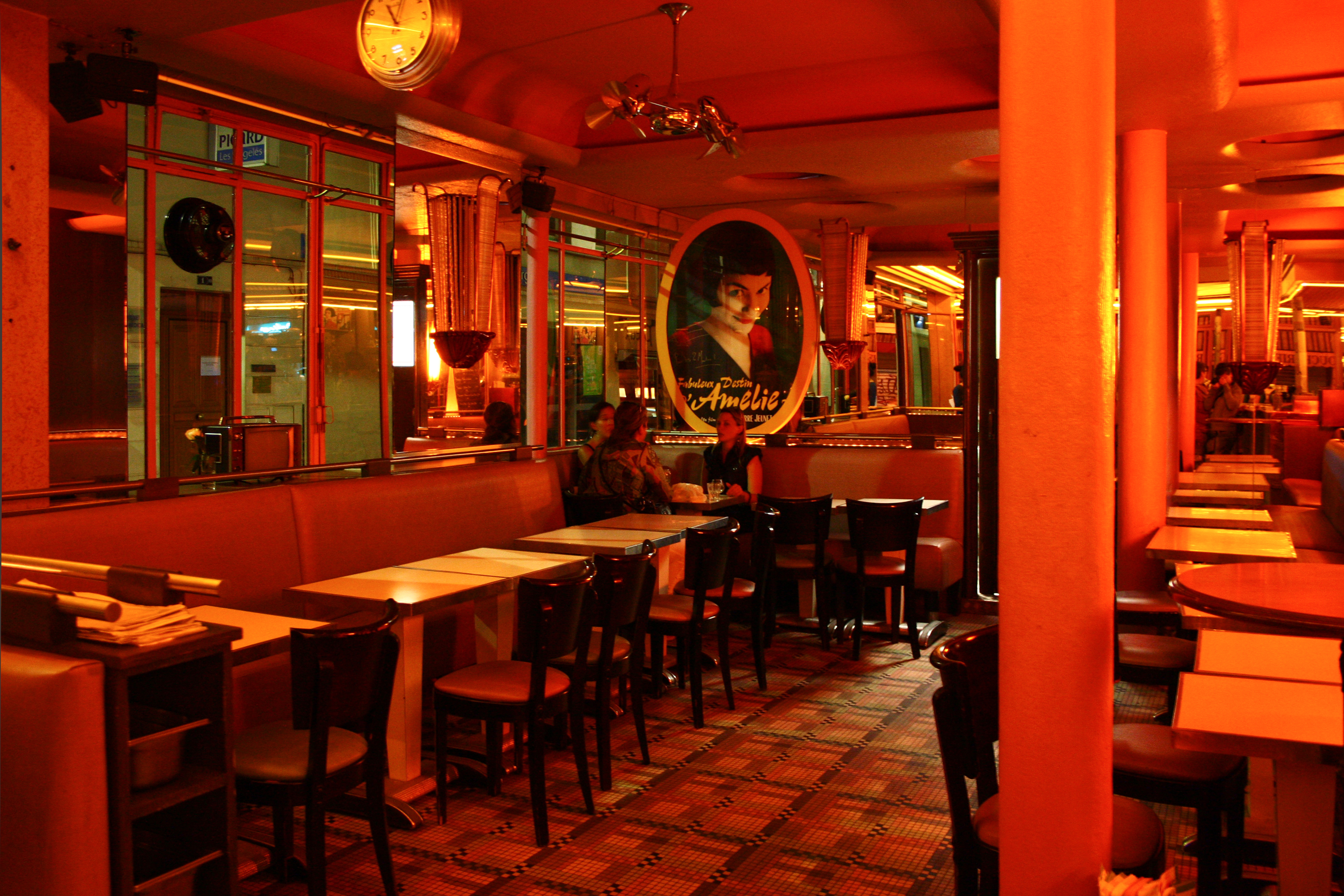 Amelie, Cafè des 2 moulins